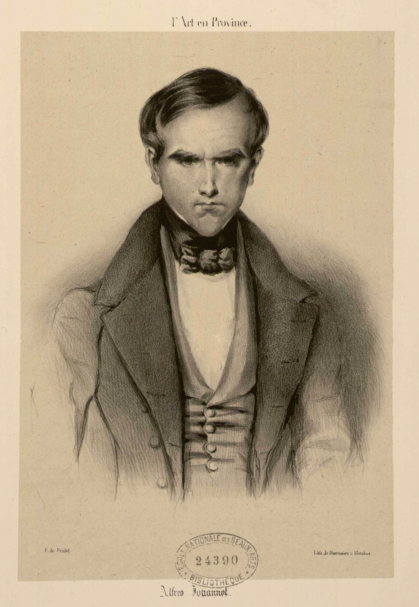 Alfred Johannot (L'art en Province) - Lithographie d'E. de Fradel